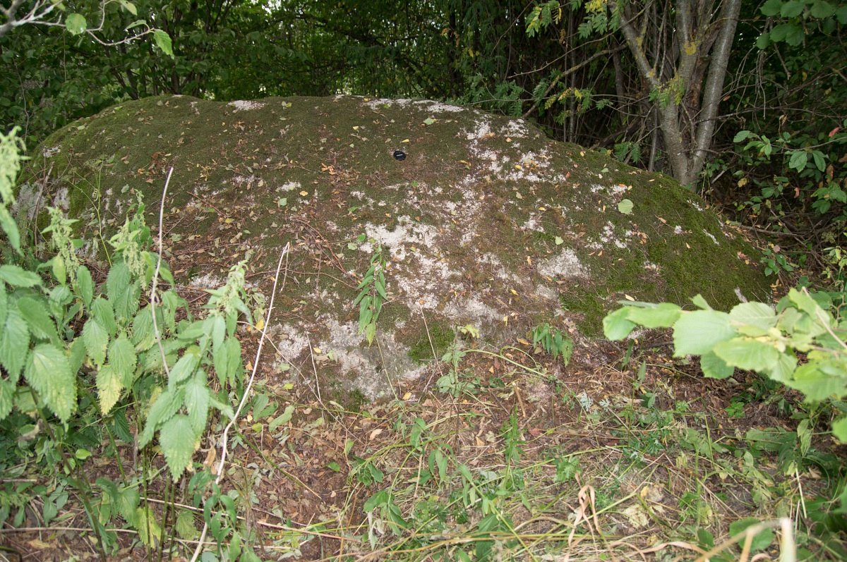 Бортнікі. Вялікі камень Бортніцкі